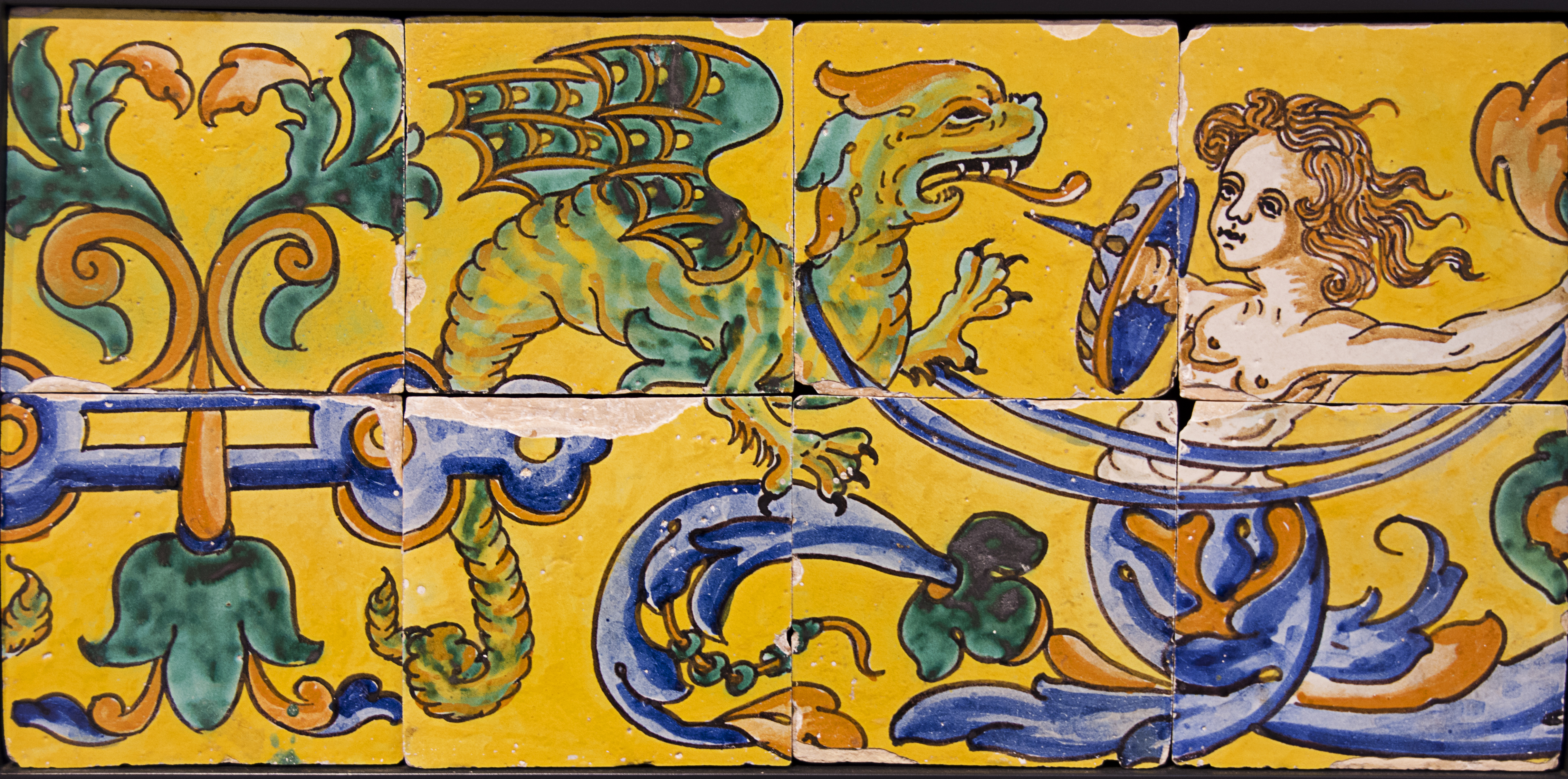 Azulejos para zócalos pintados de Hernando de Valladares. (hacia 1600I). Centro Cerámico de Triana.